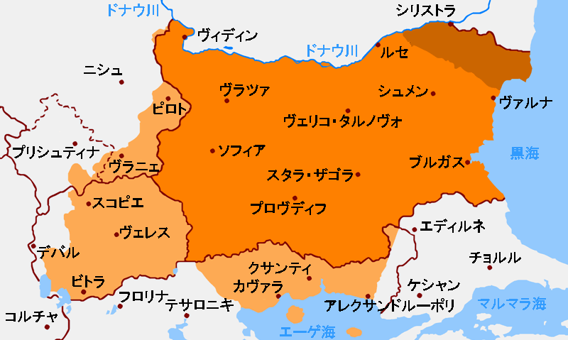 第二次世界大戦中を含むブルガリア領の変遷